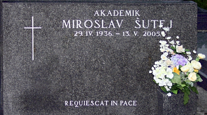 Grob Miroslava Šuteja na Mirogoju u Zagrebu